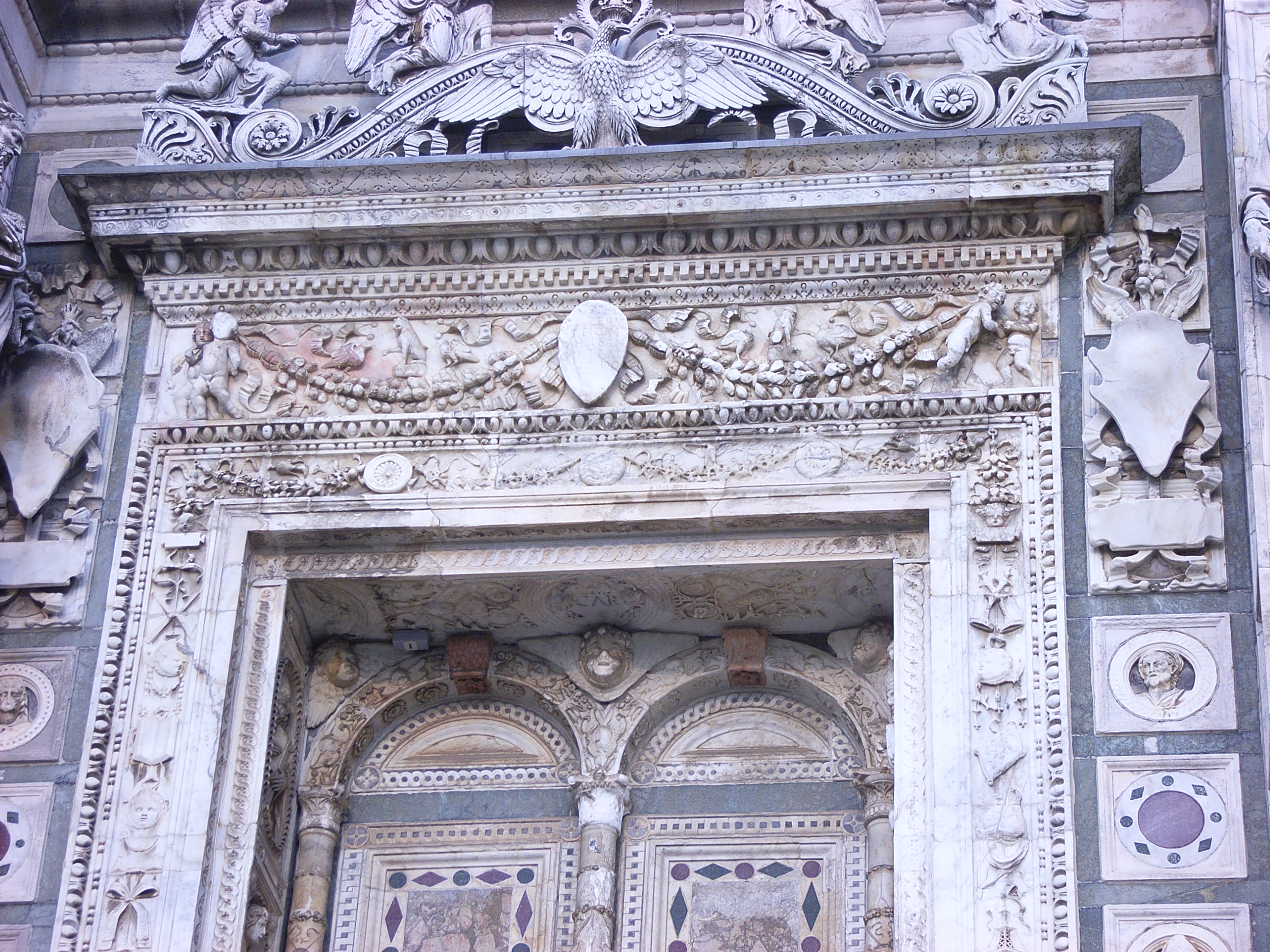 Certosa di Pavia particolare della facciata.